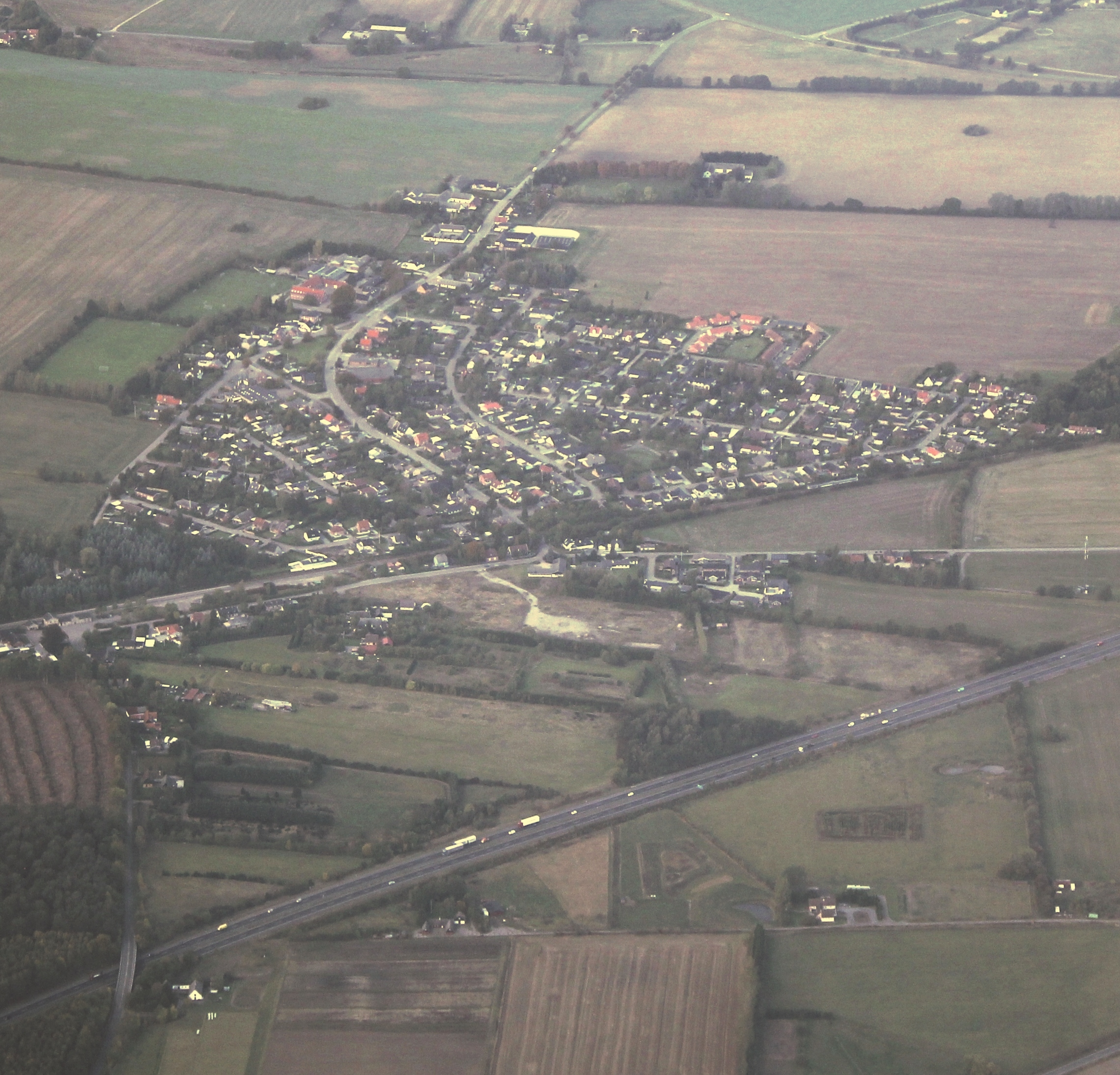 Algestrup taget fra et Iberia-fly i rute mellem Madrid og København